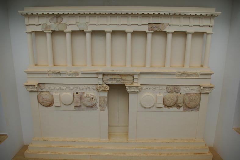 Rekonstruktion des numidischen Höhenheiligtums von Chimtou im Musée Archéologique Chimtou (Tunesien)